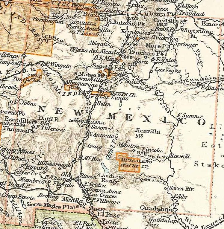 Karte von New MExico, 1893